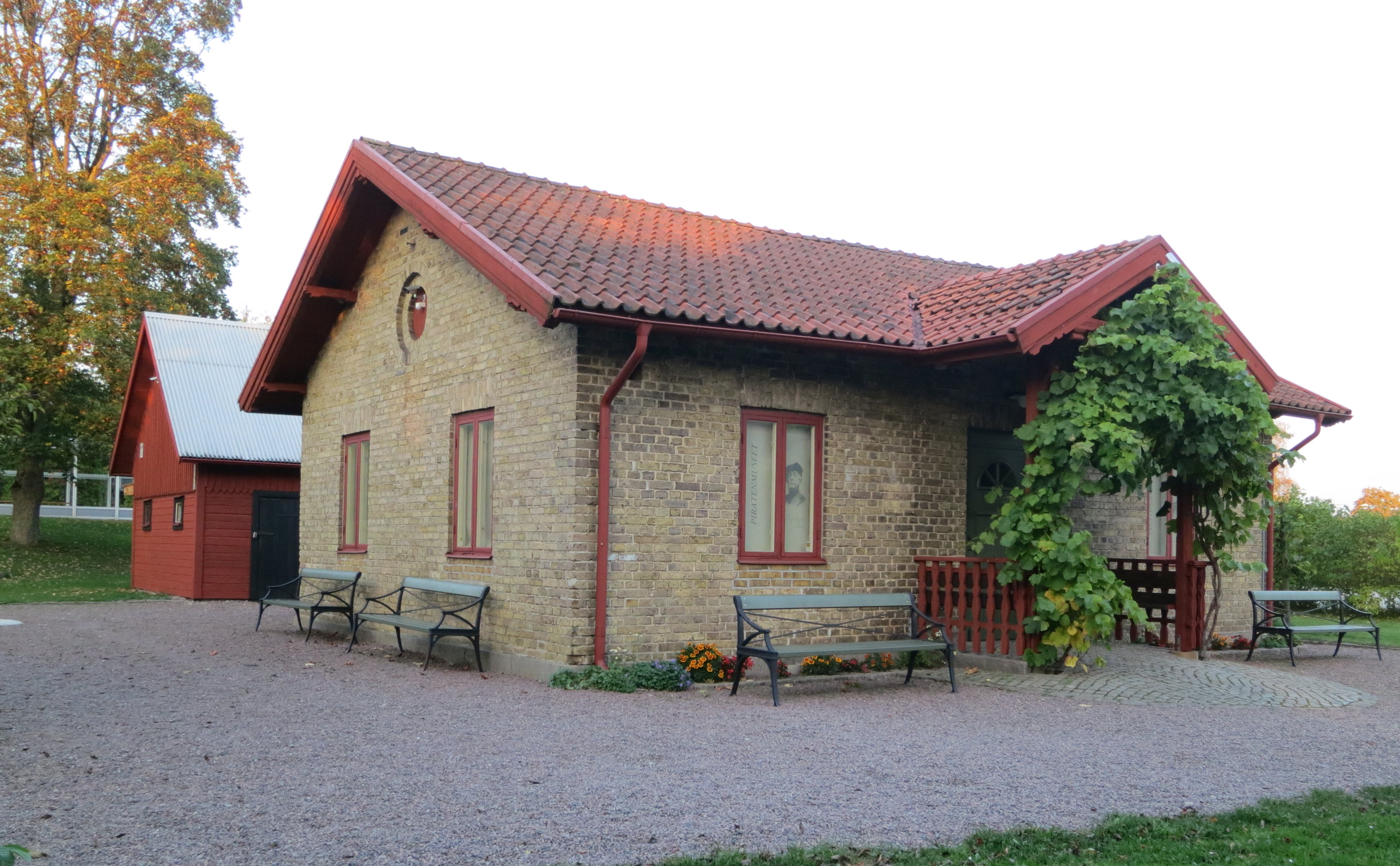 Piratenmuseet i Vollsjö